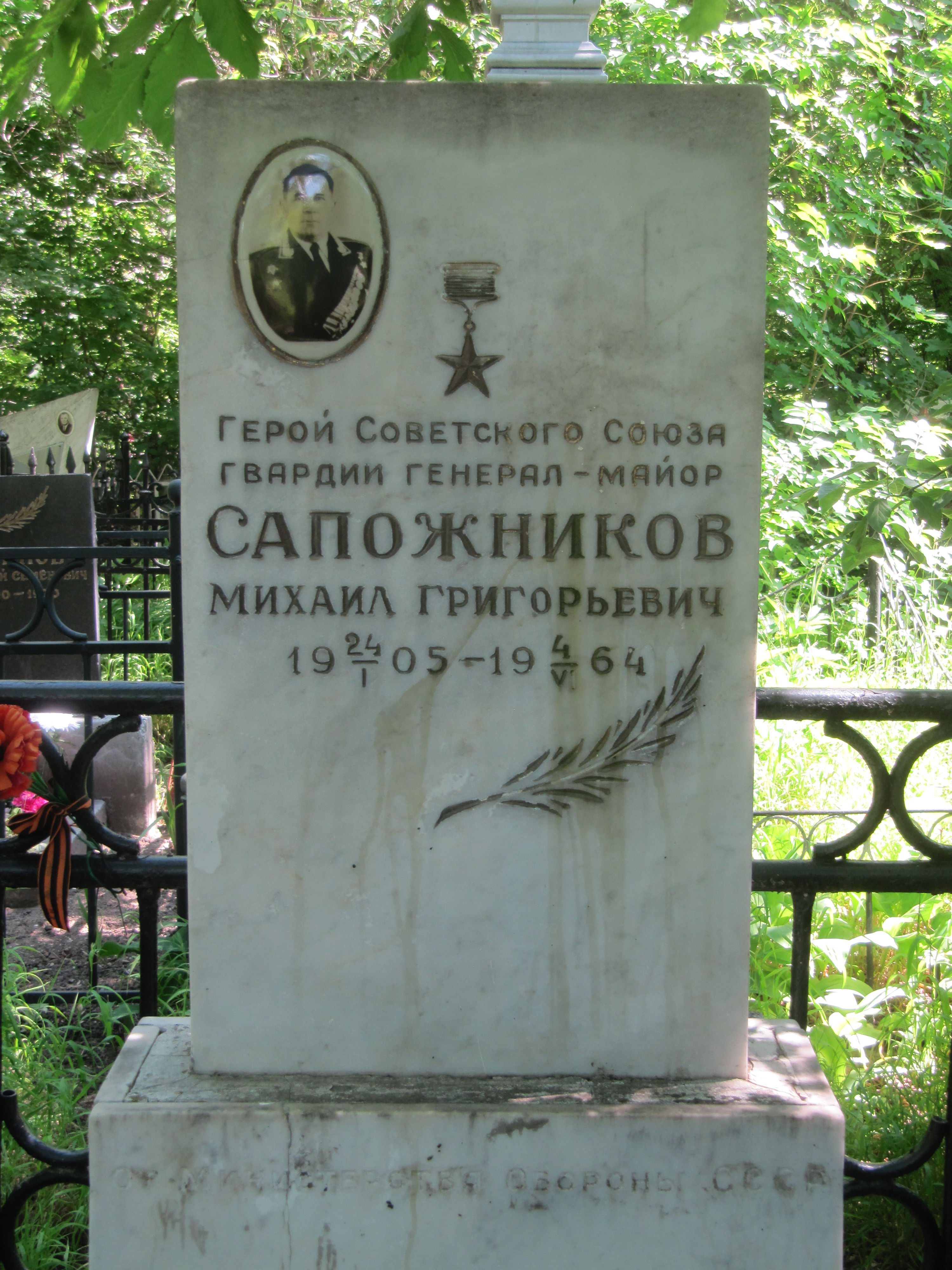 Могила Сапожникова М.Г. (1905-1964), Героя Советского союза: Воскресенское кладбище (1й участок), Саратов, Саратовская область.